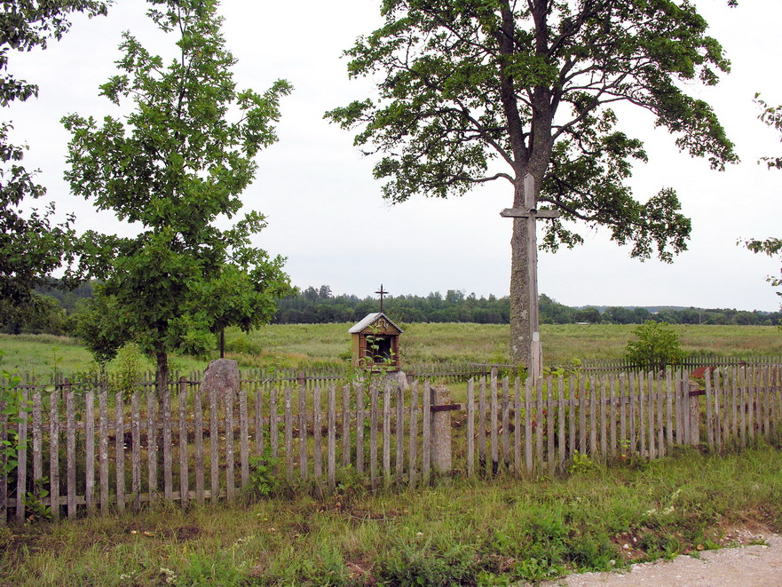 Lėtenių kaimo kapeliai, Mažeikių raj., Tirkšlių sen. Foto: Algirdas, 2006 m. rugpjūčio 2 d., Lietuva